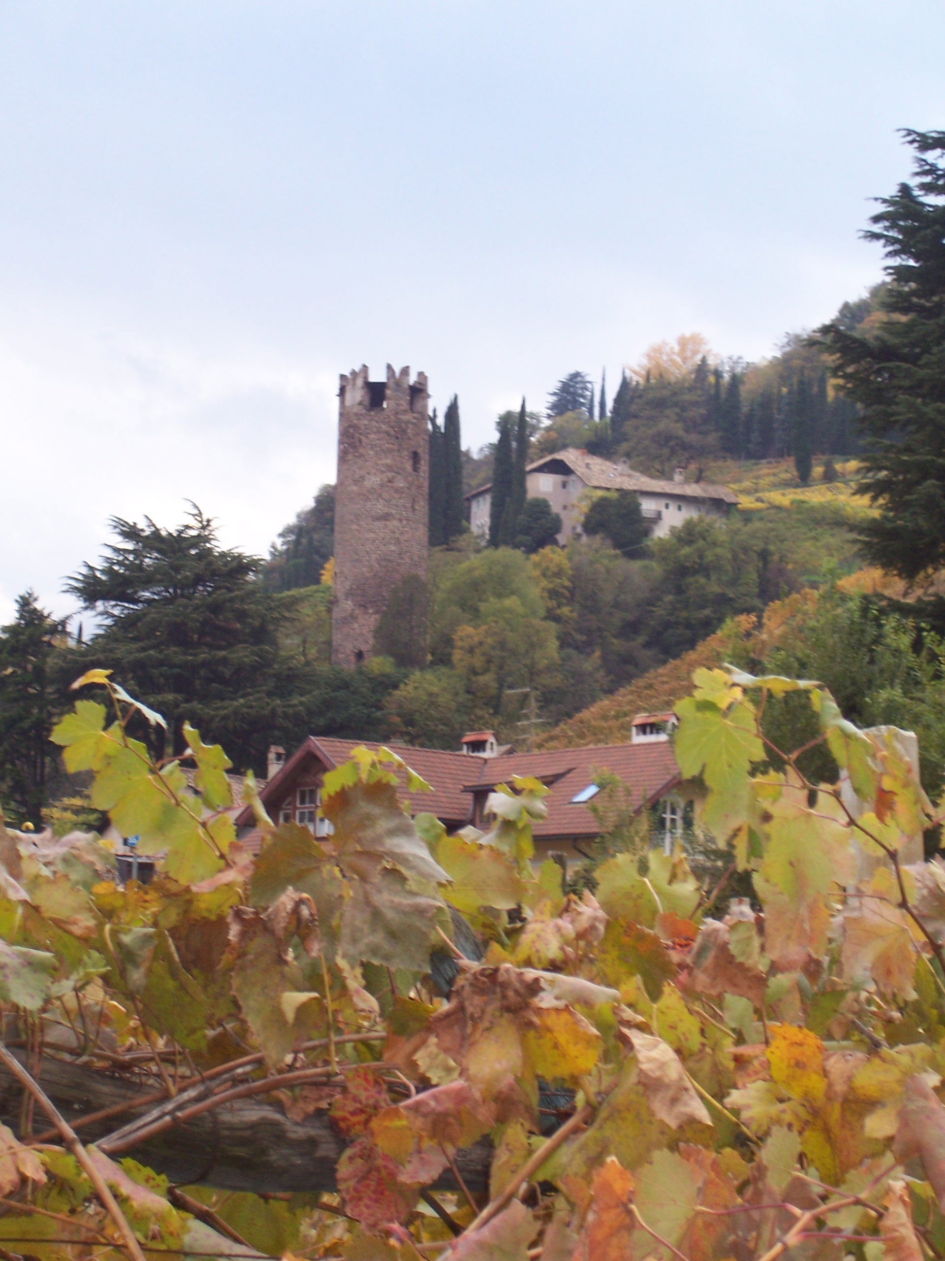 Torre Druso/Gscheibter Turm in Bolzano/Bozen